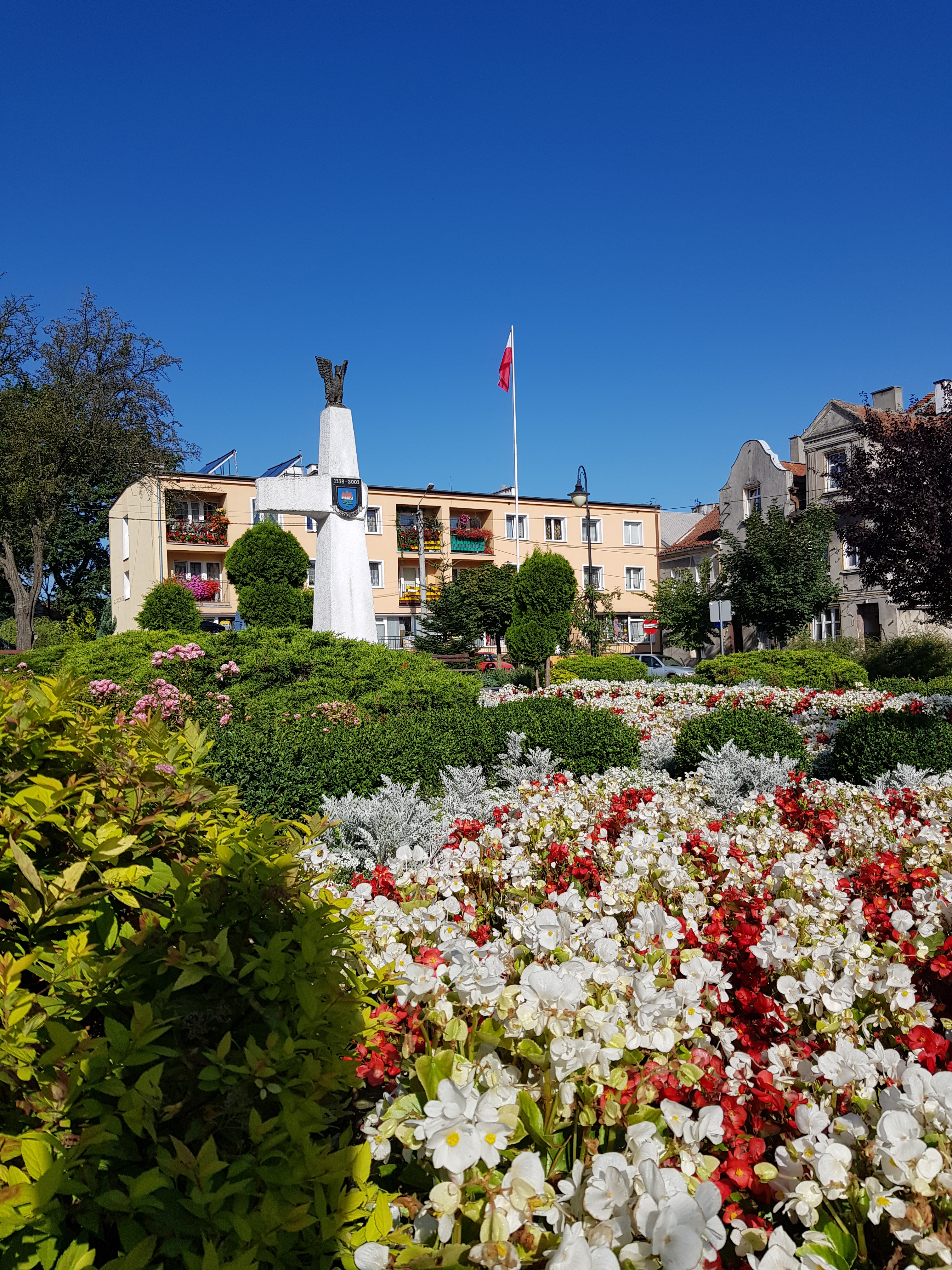 Plac Jedności Narodowej w Jezioranach.